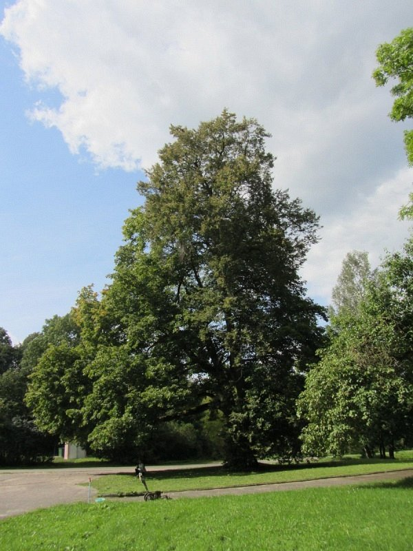 Бердаўка. Сядзібны парк